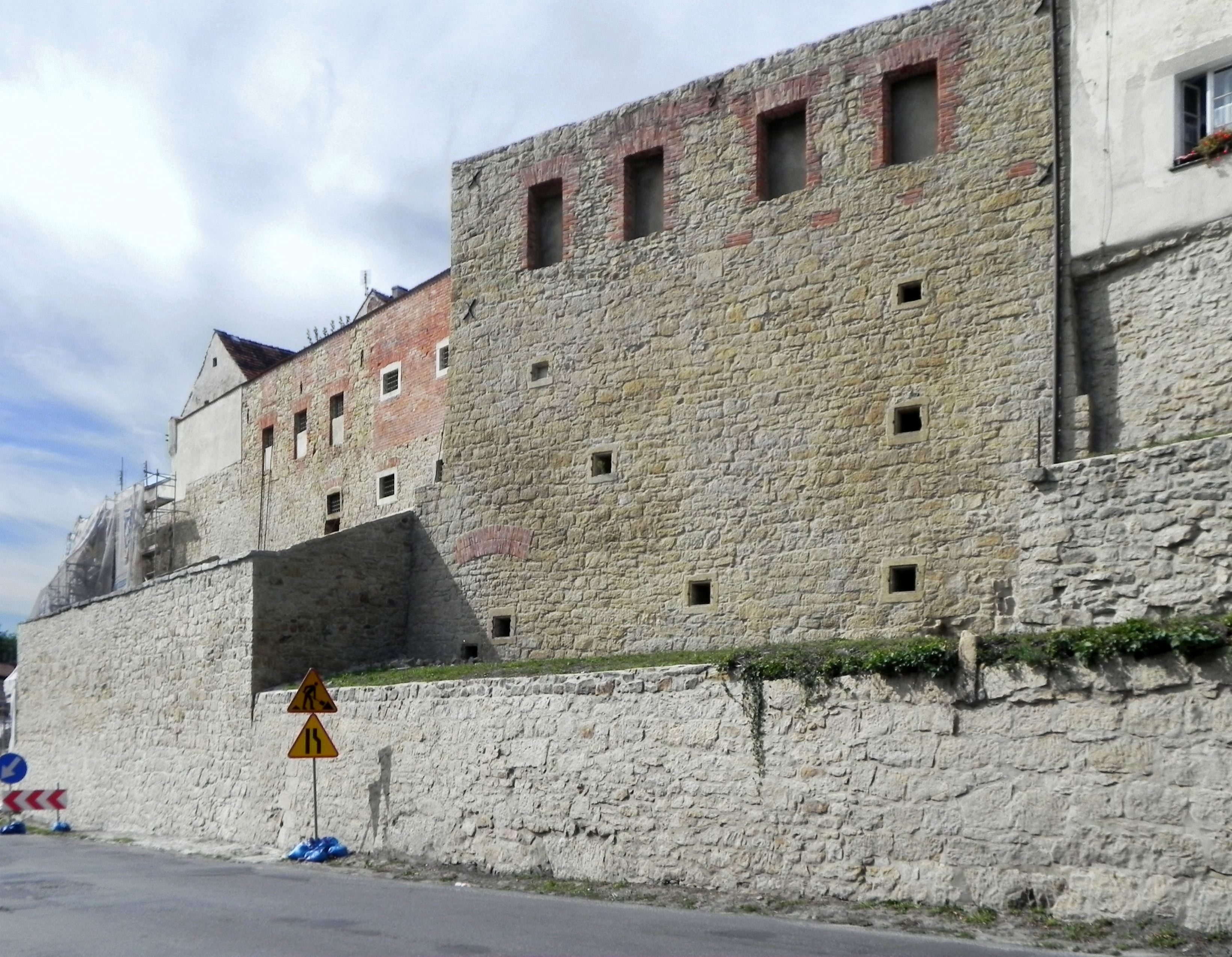 Bystrzyca Kłodzka, mury obronne